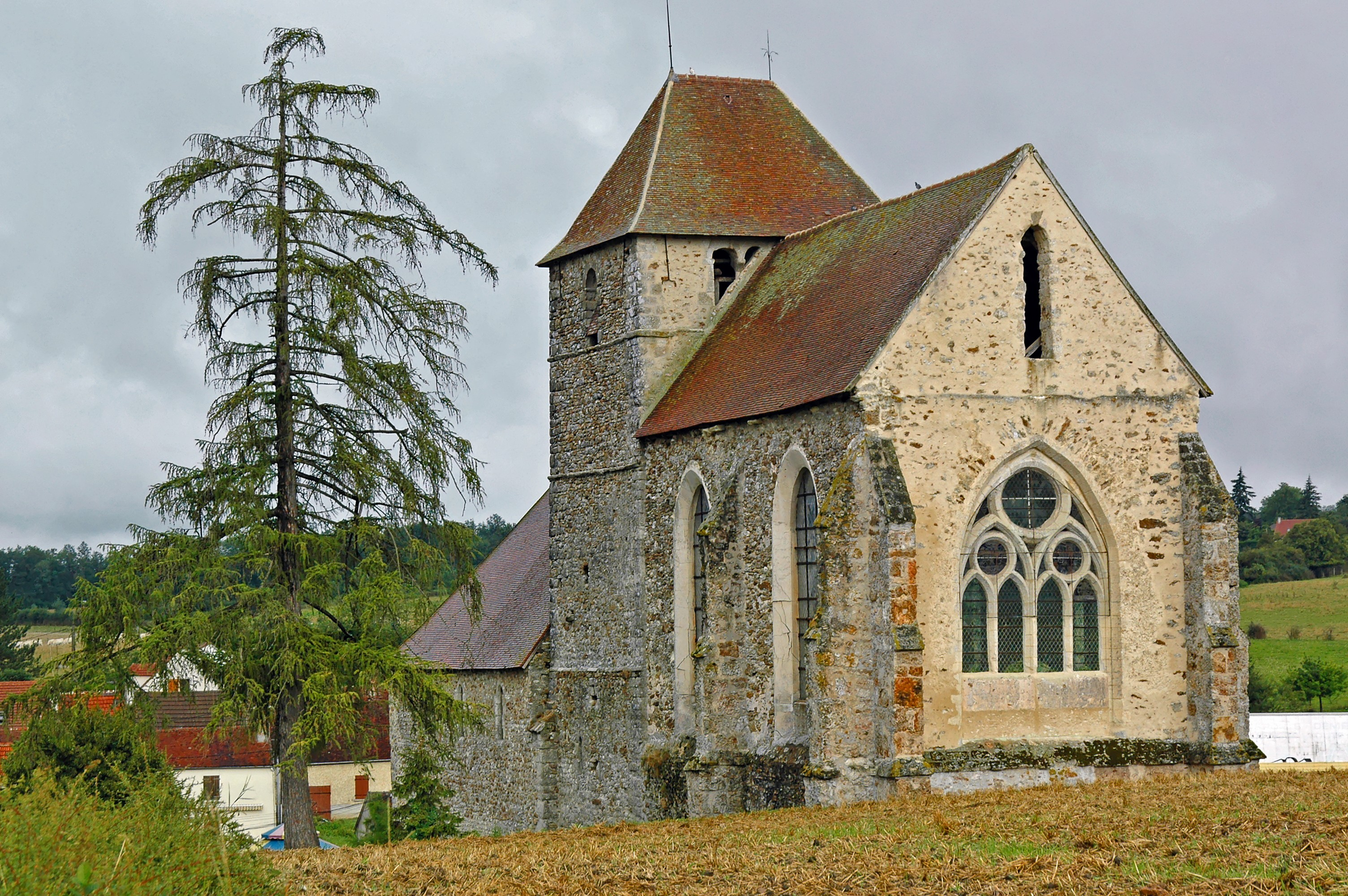 Église de Viffort, dans le sud de l'Aisne.